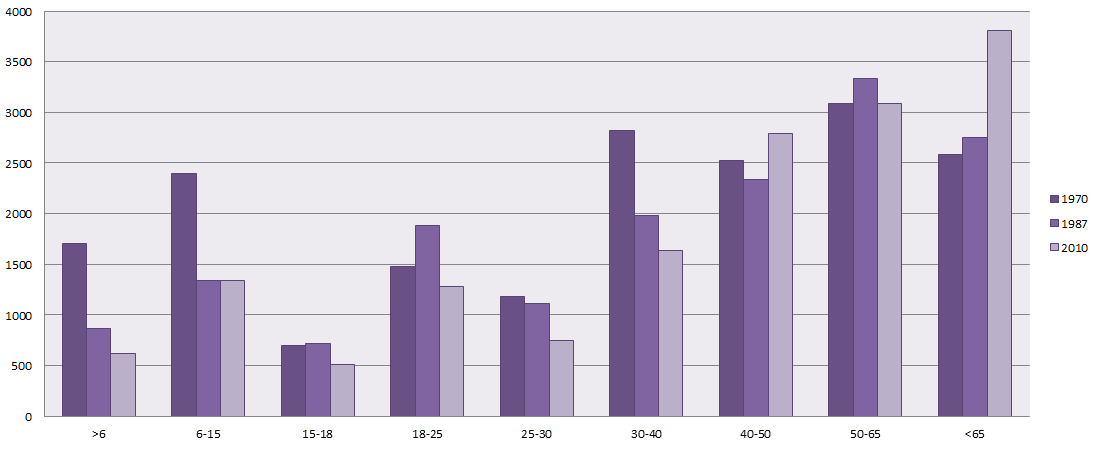 Altersstruktur